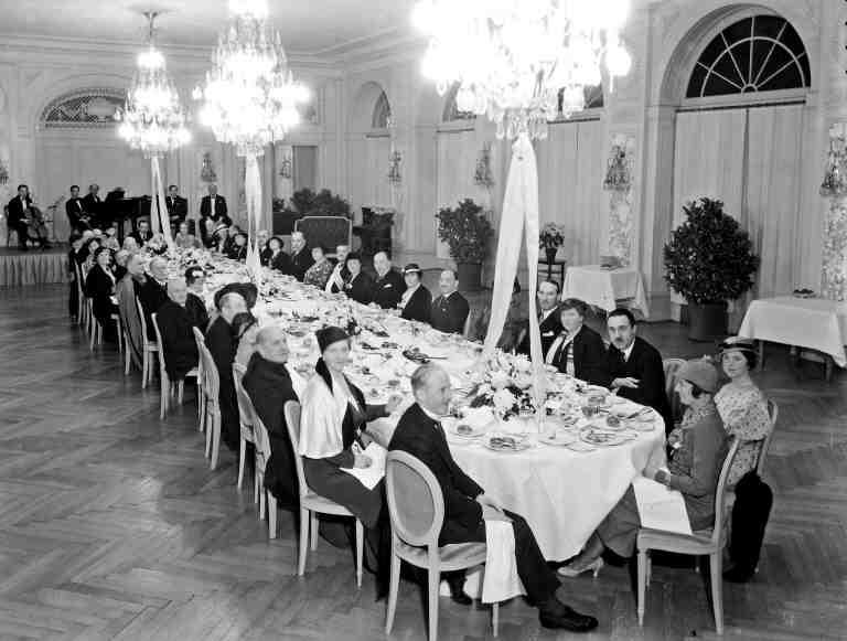 Empfang von Minister von Meyer im Hotel Bellevue, Bern (Schweiz)